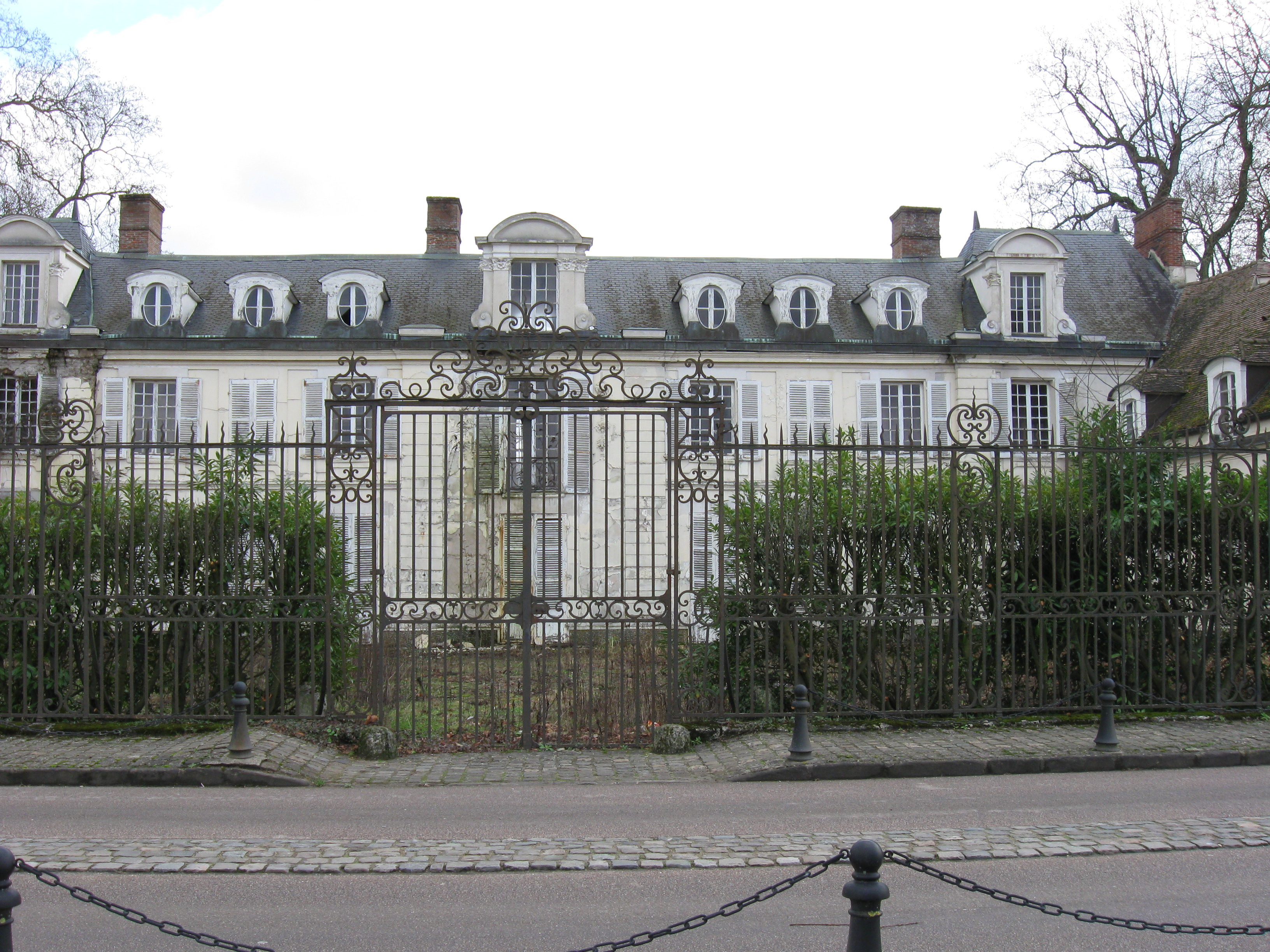 Château de Lesches. (Seine-et-Marne, région Île-de-France).